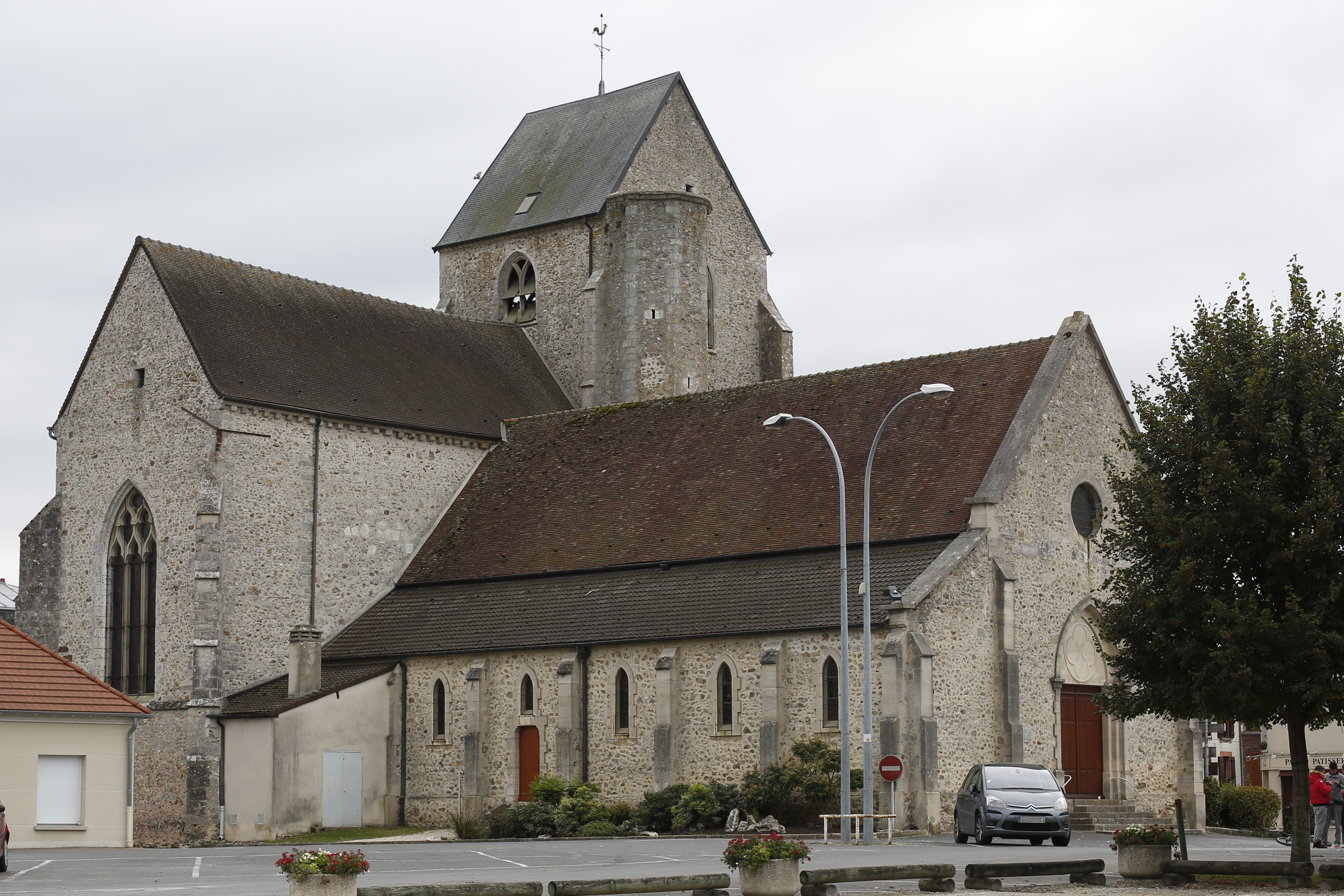 Église Saint-Remi d'Esternay.